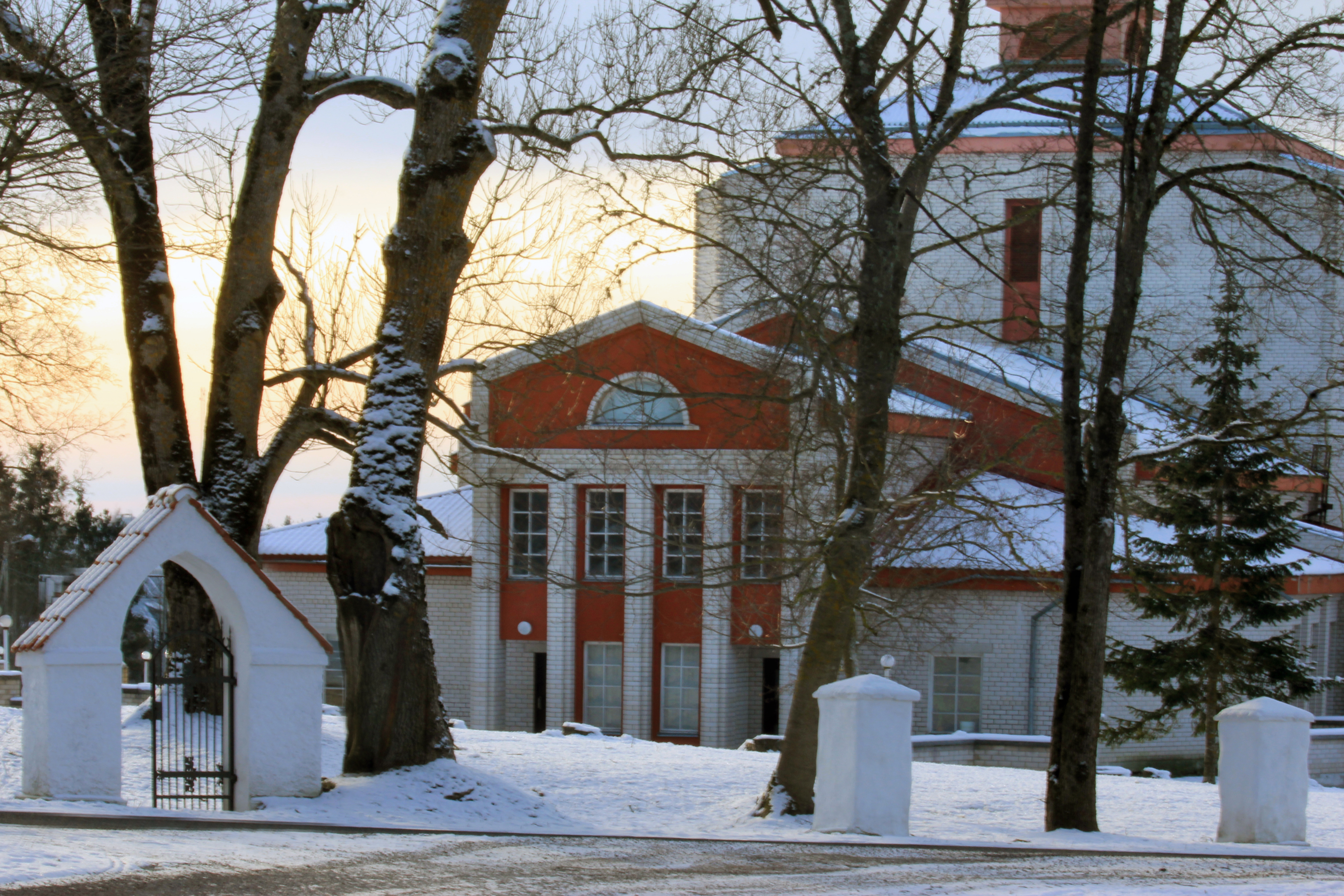 Lihula kultuurimaja (ehit. 1990, arh.R.Tomingas).Vaade Lossimäelt.